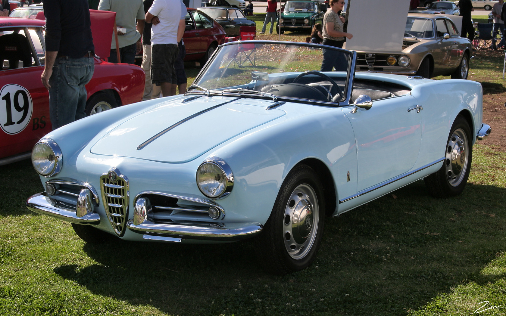 1958 Alfa Romeo Giulietta Spider - lt blue - fvl